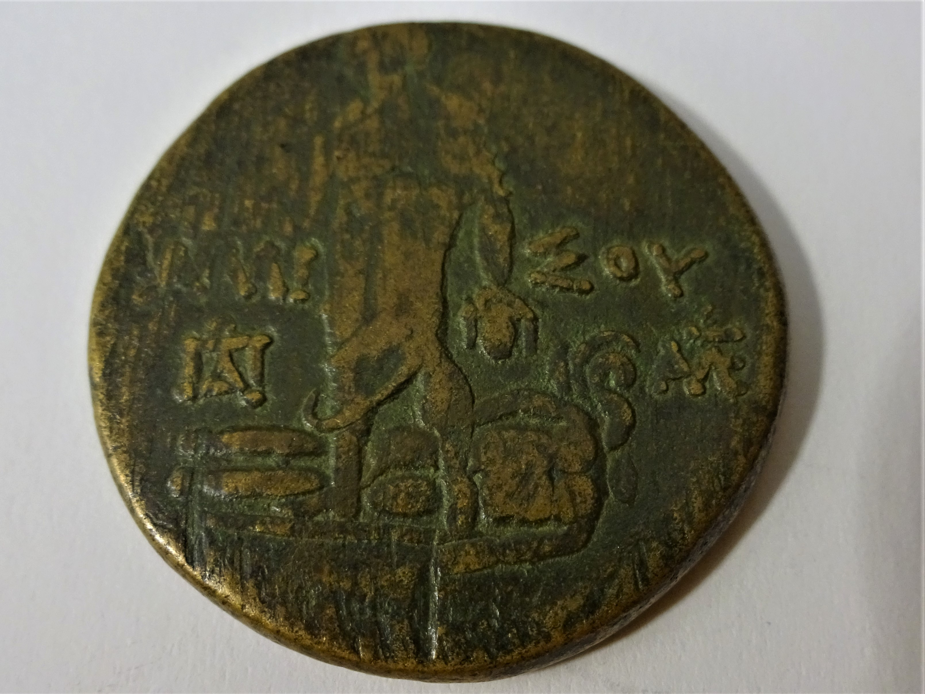 Perseus mit dem abgetrennten Kopf der Medusa in der linken Hand auf Münze aus Amisos, Szaivert/Sear Nr. 3609